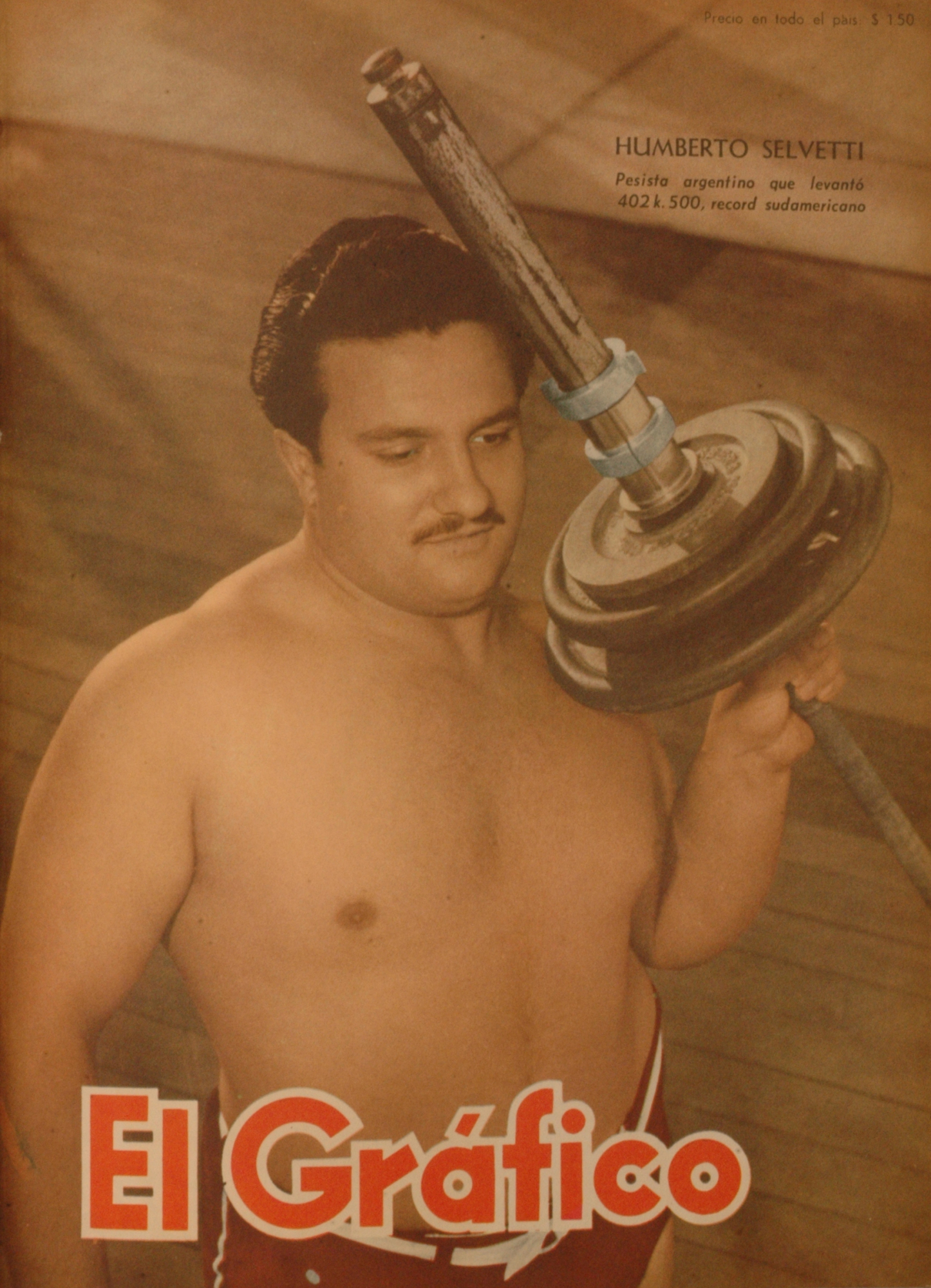 El Grafico del 29 de Febrero de 1952. Edicion 1699